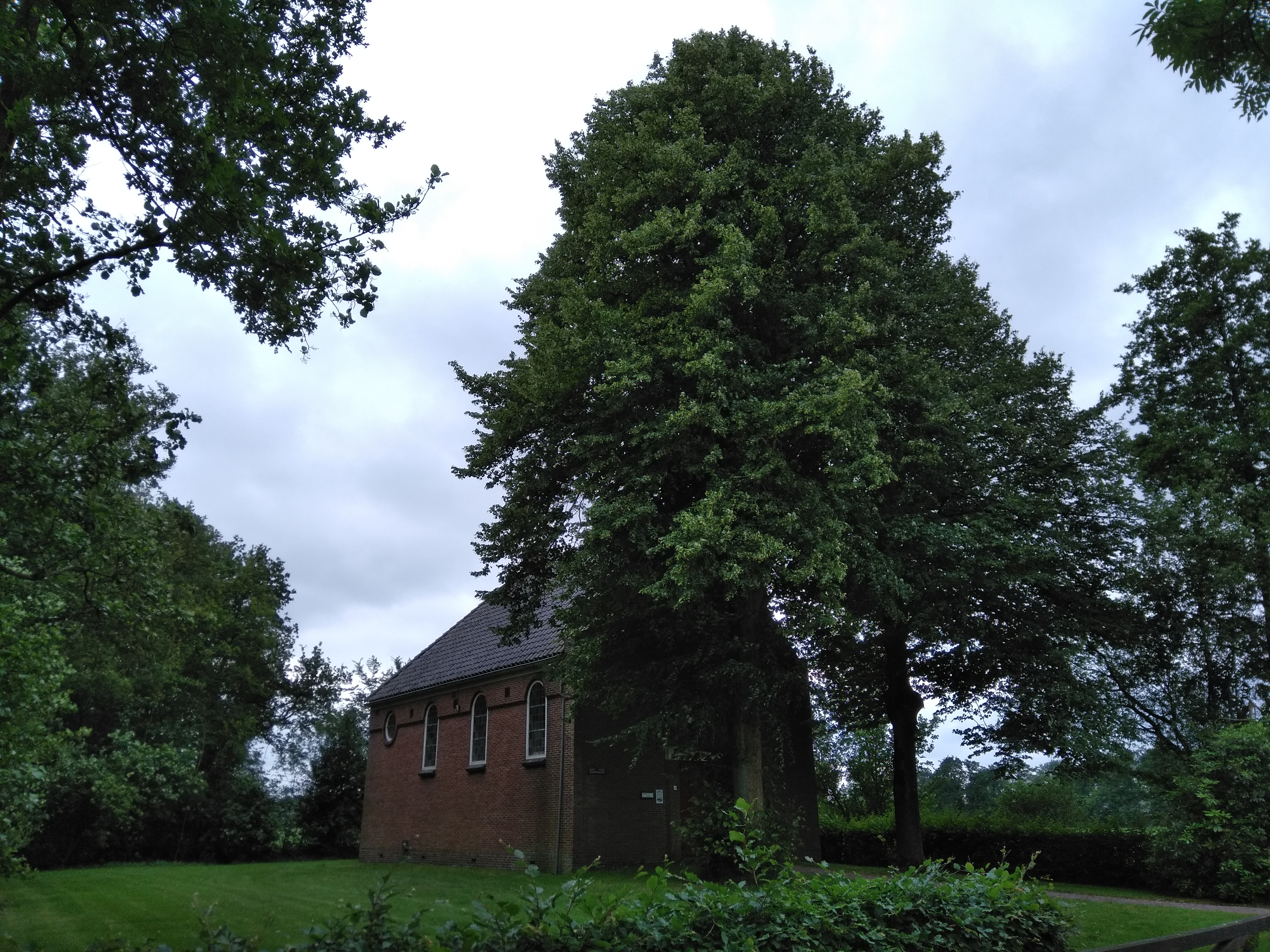 Hervormde kerk uit 1949 te Siegerswoude, Opsterland, Friesland.